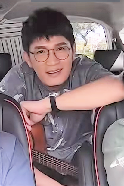 WebTVAsia 網羅大明星 主持人：羅文裕 Wing、王宏恩 Biung